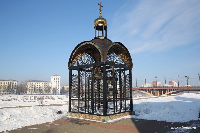 Віцебск.